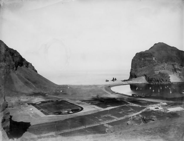 Á kreppuárunum á fjórða tugi þessarar aldar var gjörður íþróttavöllur úr sandflötunum vestan við innri höfnina í Vestmannaeyjum. Hann var unninn í atvinnubótavinnu á þeim sultar- og hörmungarárum. Þessi íþróttavöllur var notaður þarna aðeins nokkur ár. Hann varð brátt að víkja fyrir stœkkun hafnarinnar. Þá misstu margir Eyjabúar þar kálgarða sína, sem þeir höfðu ræktað um árabil, þar sem nú er hin góða og mikilvæga Friðarhöfn og Friðarhafnarbryggja.